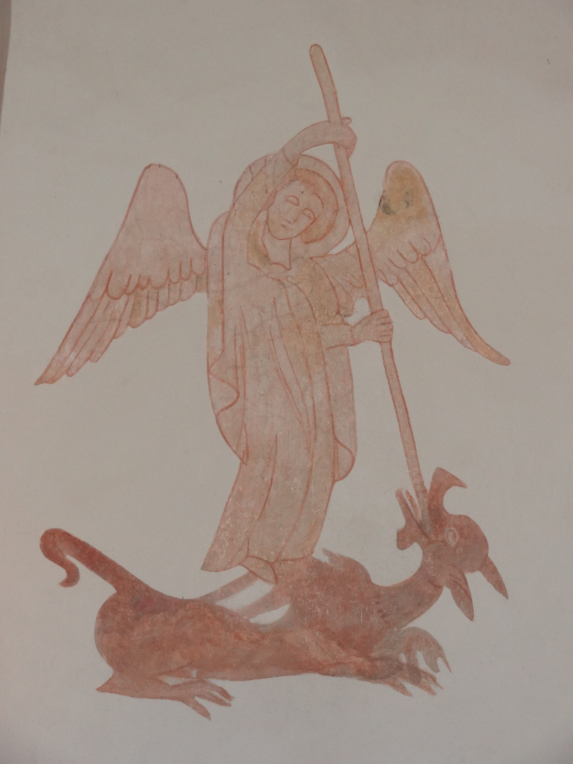 Evangelische Pfarrkirche Langd